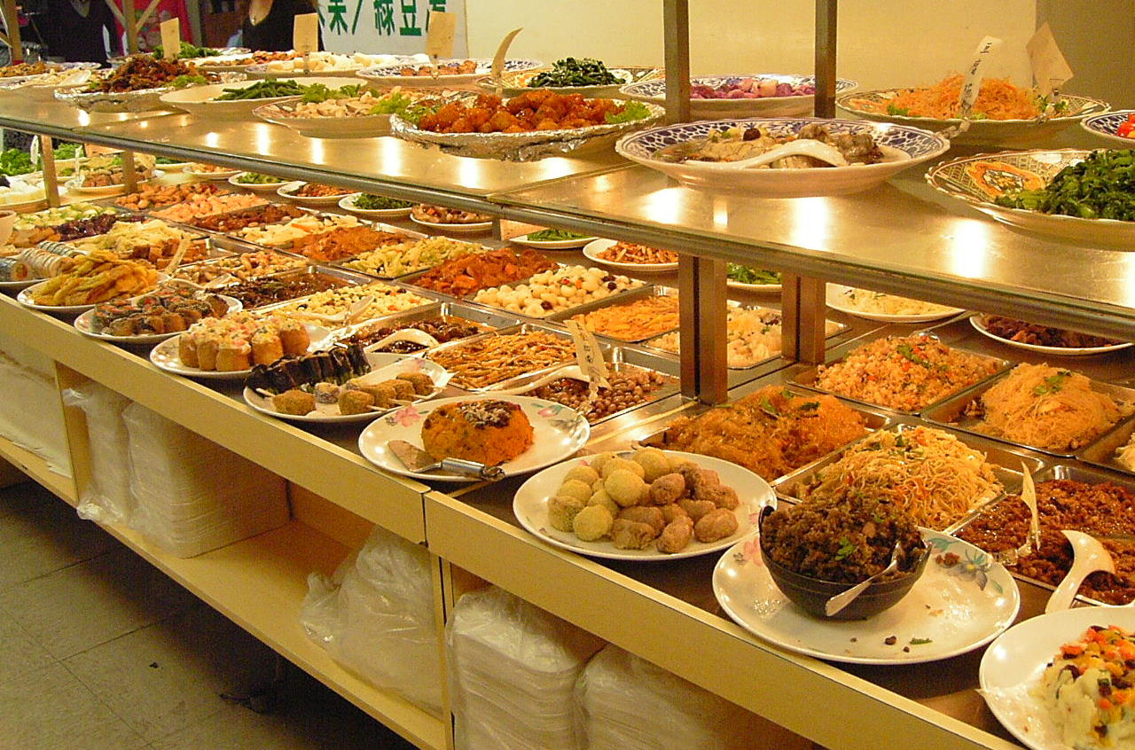 Taiwanese style vegetarian buffet. Taipei, Taiwan